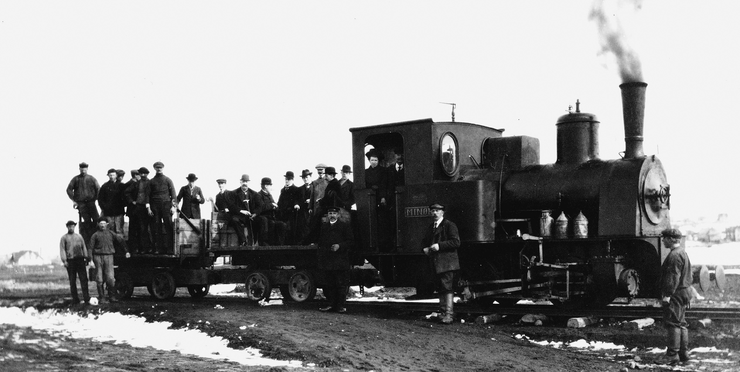 "Lok Minor - erste Fahrt 1913" - laut Bildbeschreibung in isländischer Sprache - Foto einer Informationstafel am Hafen von Reykjavik (aufgenommen im Juni 2009 von Manfred E. Fritsche)